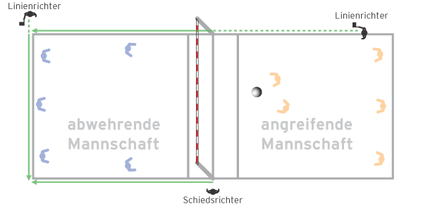 Faustball Position und Sichtbereich der Unparteiischen (schematisch)